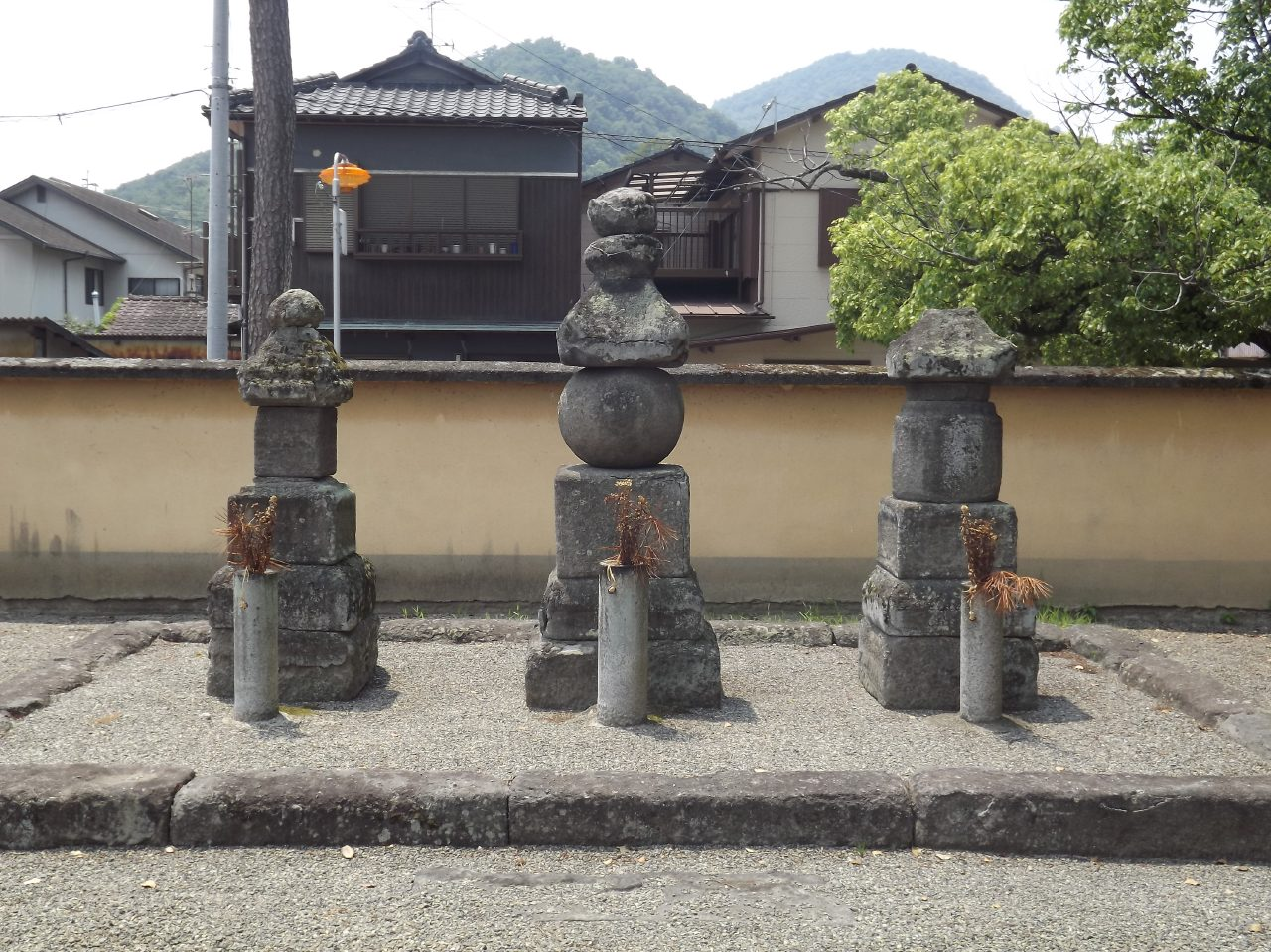 善通寺の三帝御廟